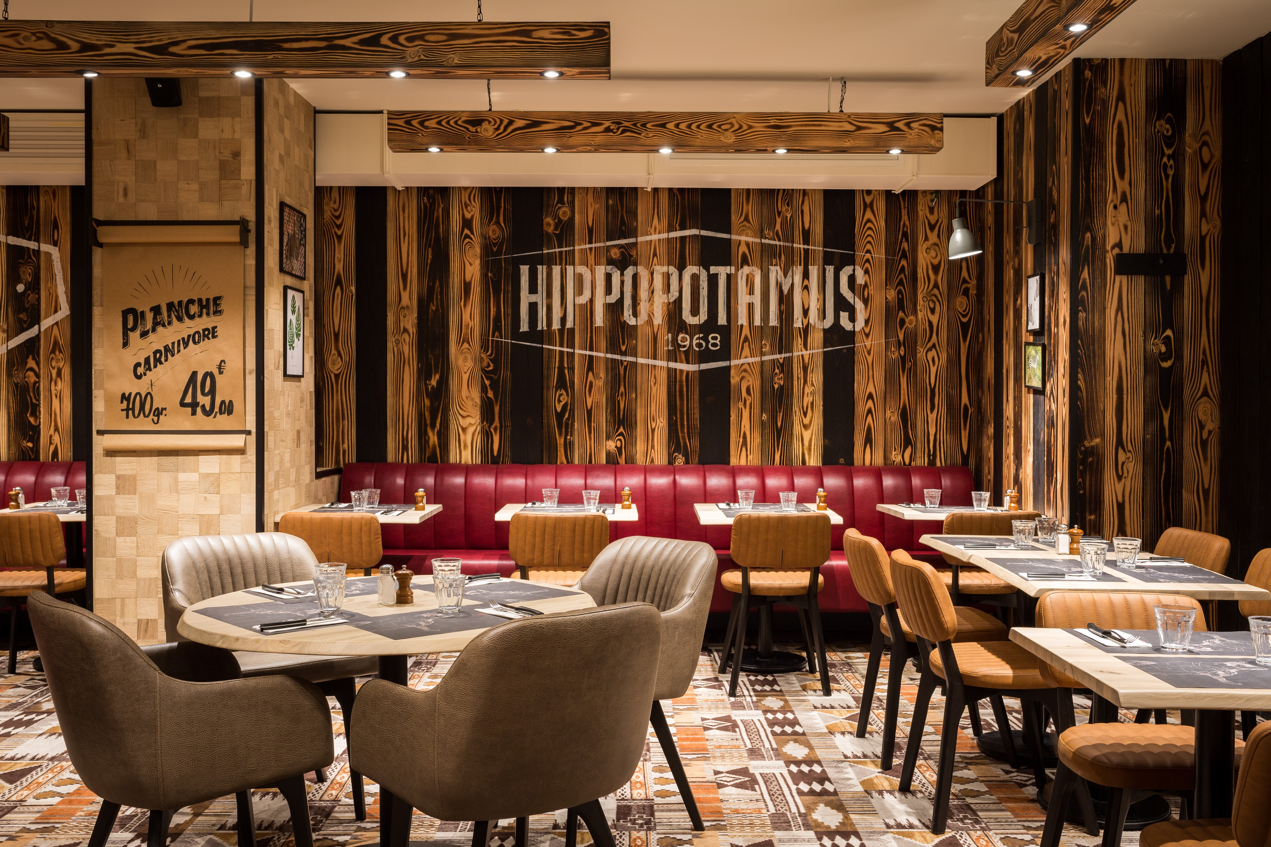 Hippopotamus Montparnasse Paris